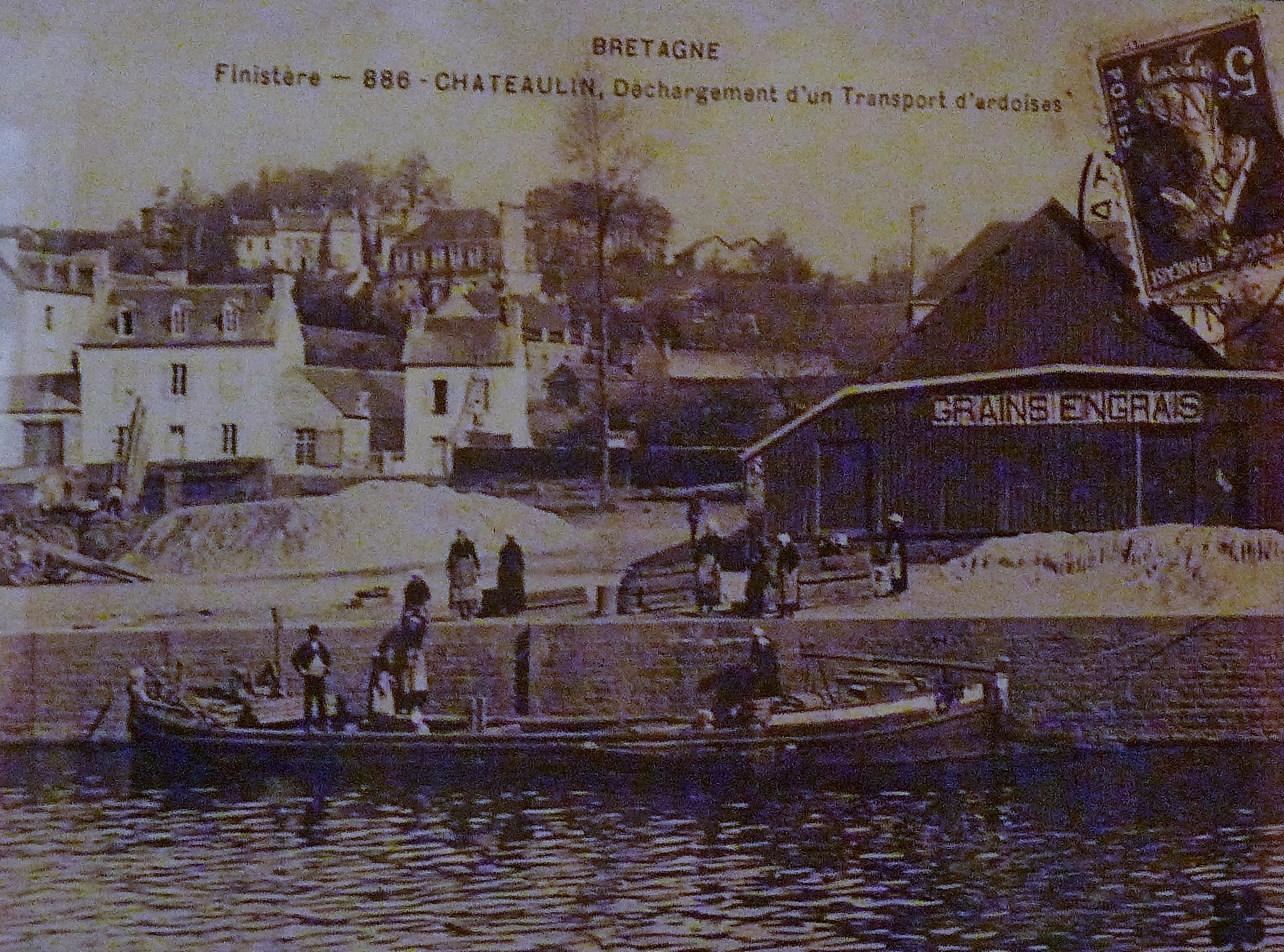 Déchargement d'un transport d'ardoises à Châteaulin à la fin du XIXe siècle